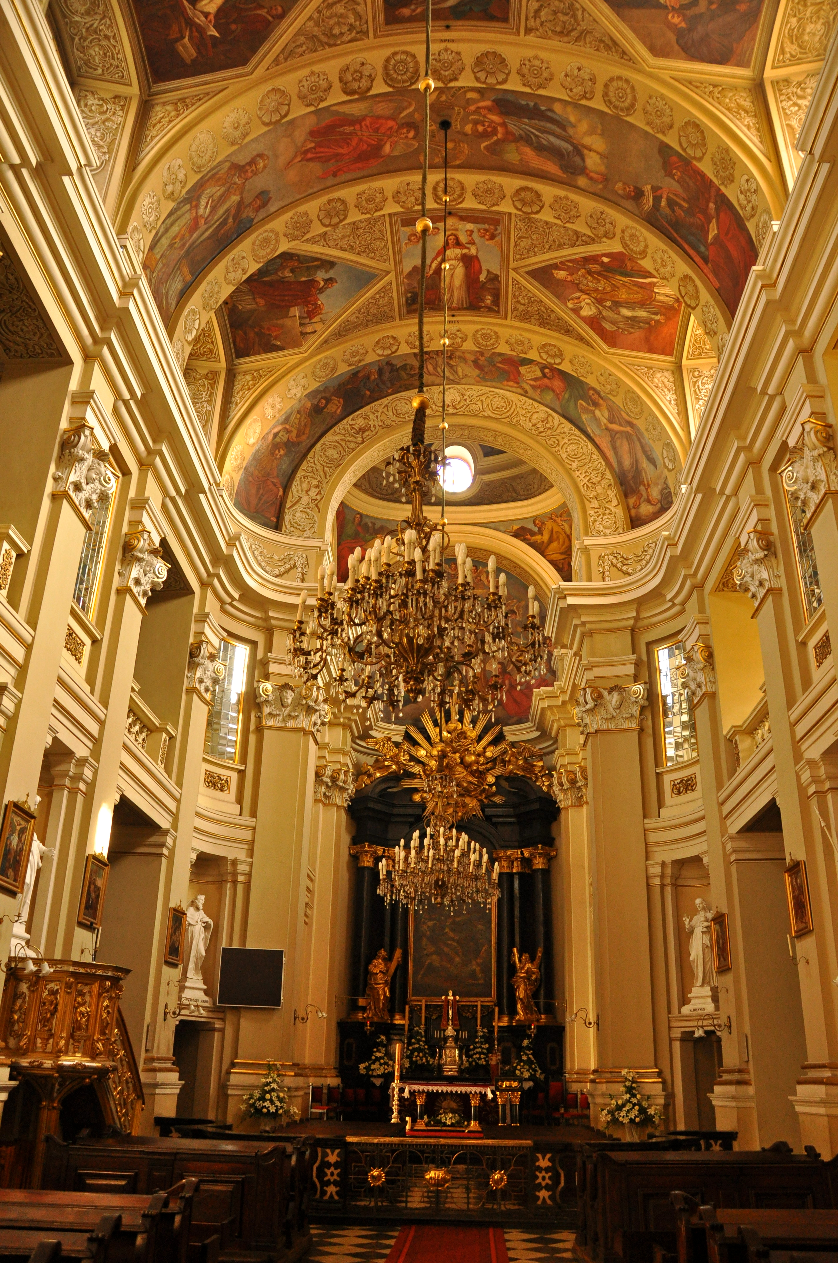 Kościół Nawrócenia św. Pawła w Krakowie